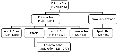 franca dinastio dum la centjara milito